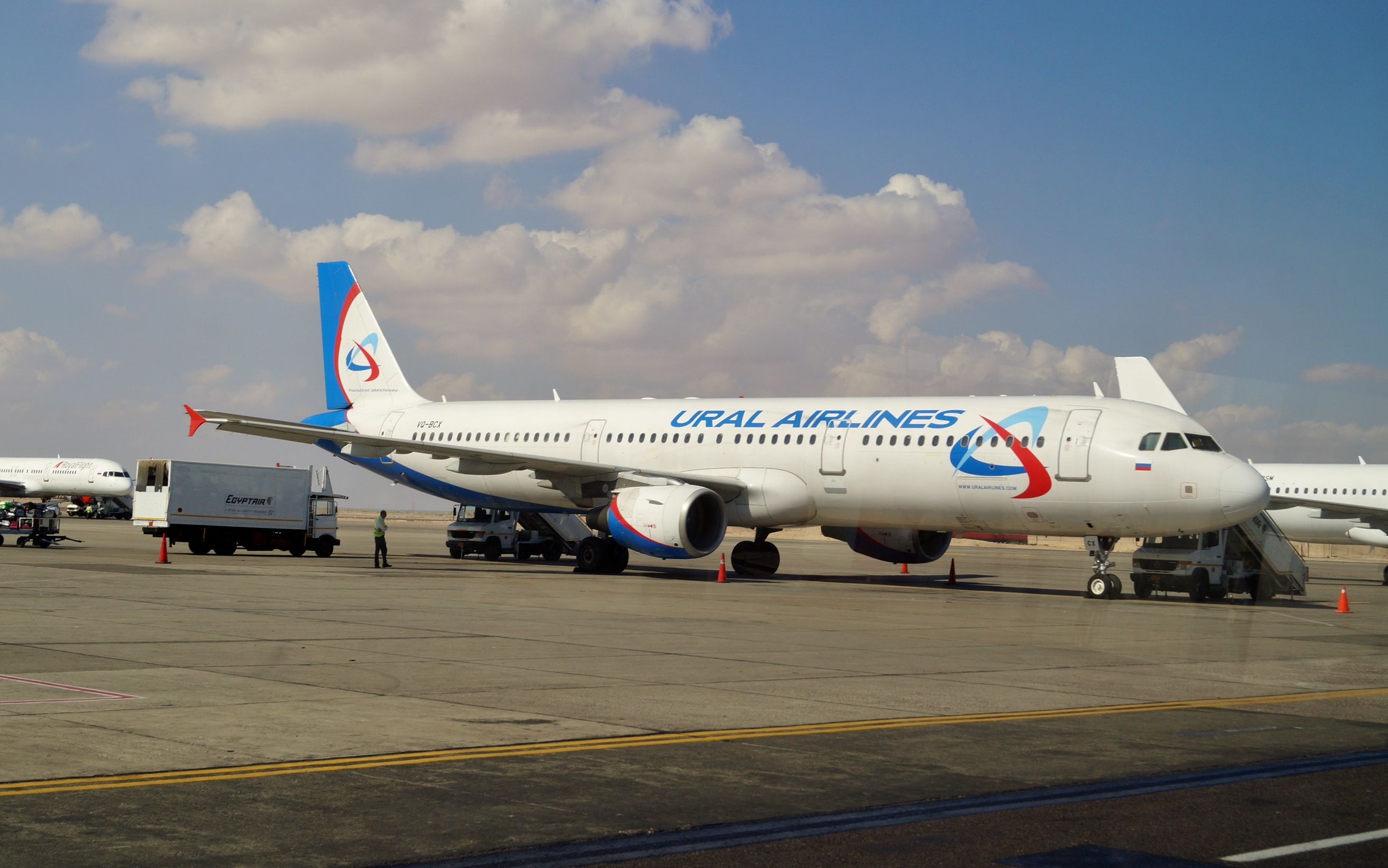 Самолёт Уральских Авиалиний в Египте